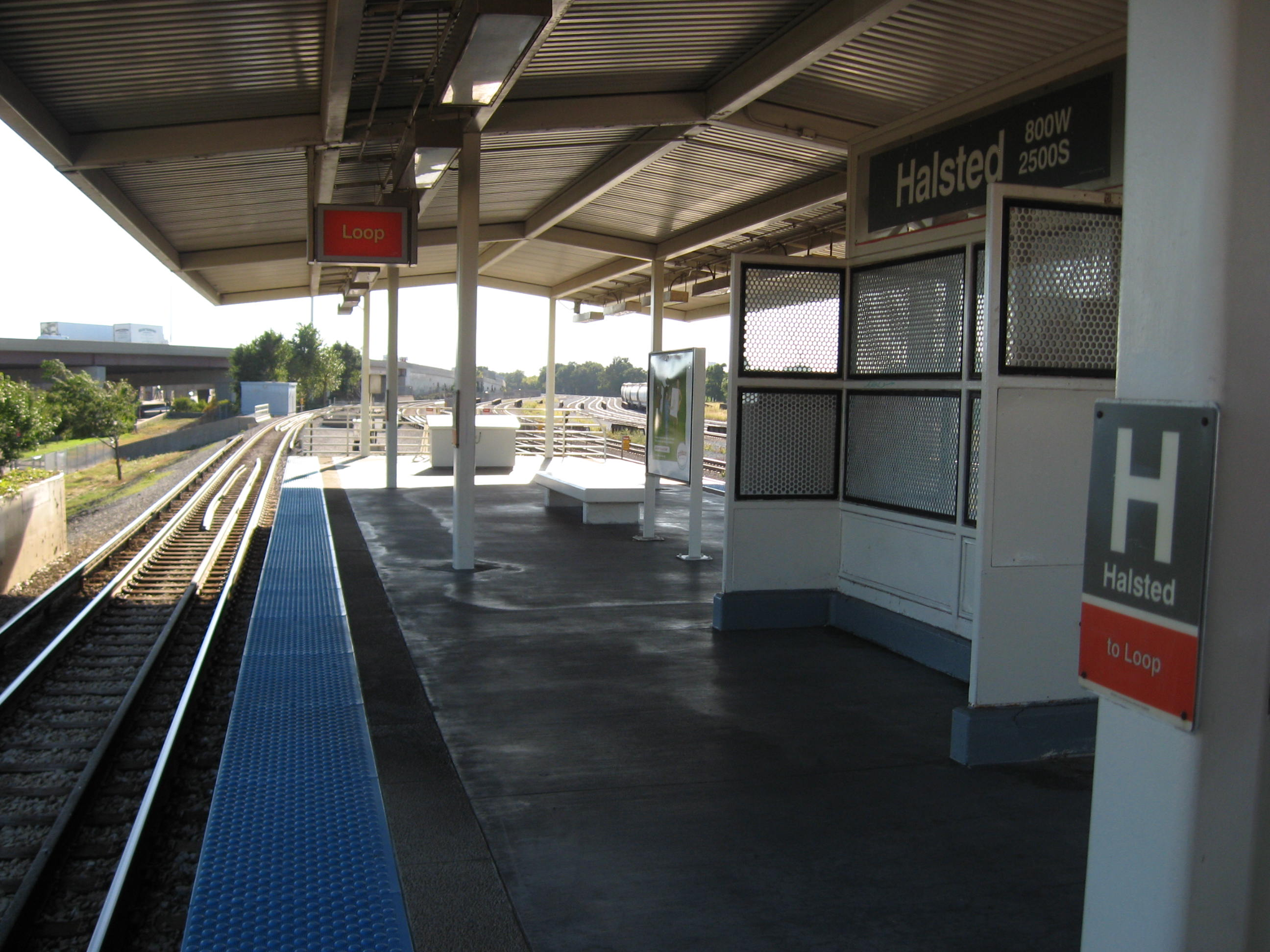 Halsted CTA Orange Line